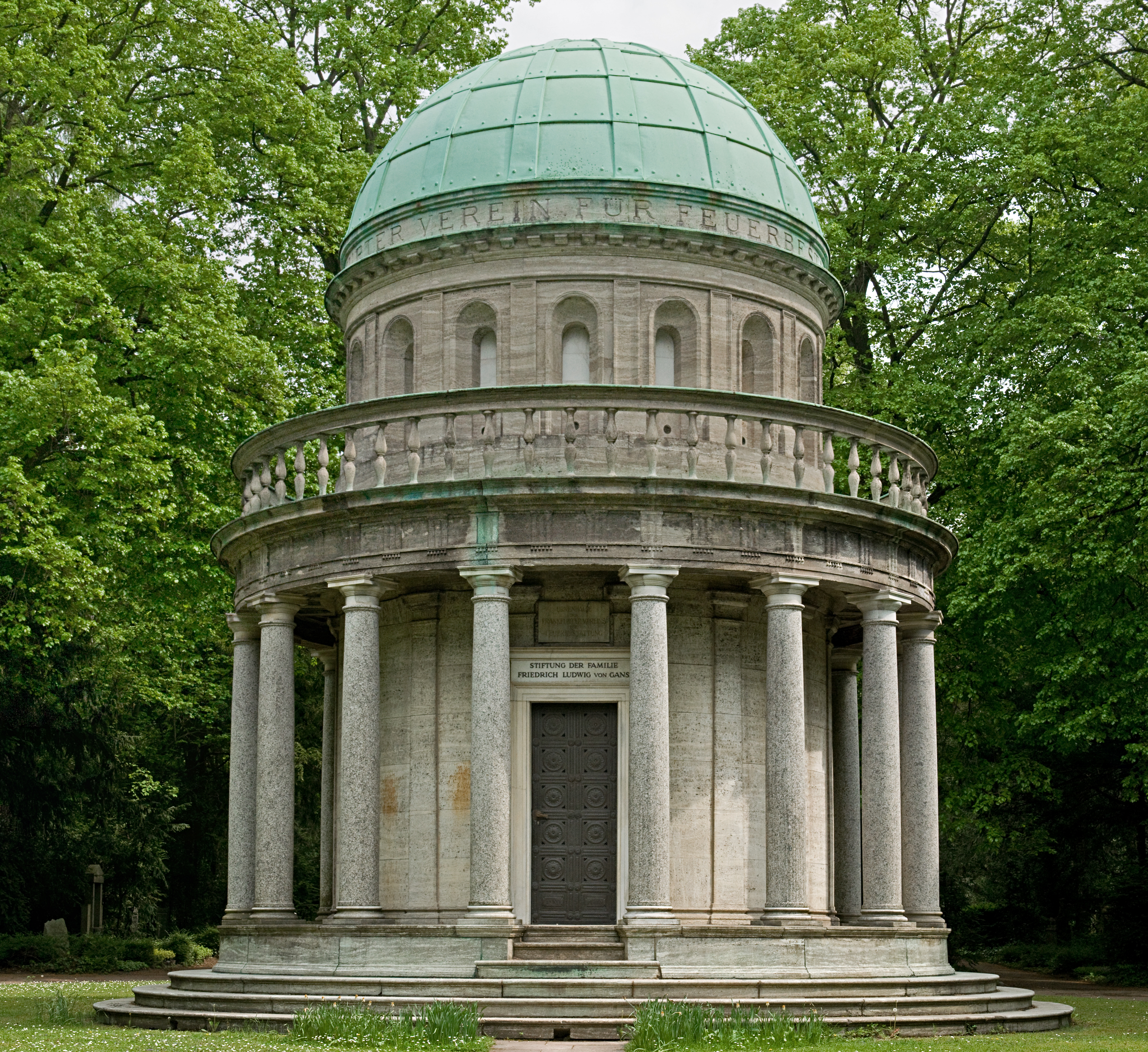 Mausoleum von Gans auf dem Hauptfriedhof Frankfurt am Main